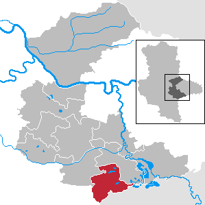 Sandersdorf-Brehna, Sachsen-Anhalt - Landkreis Anhalt-Bitterfeld